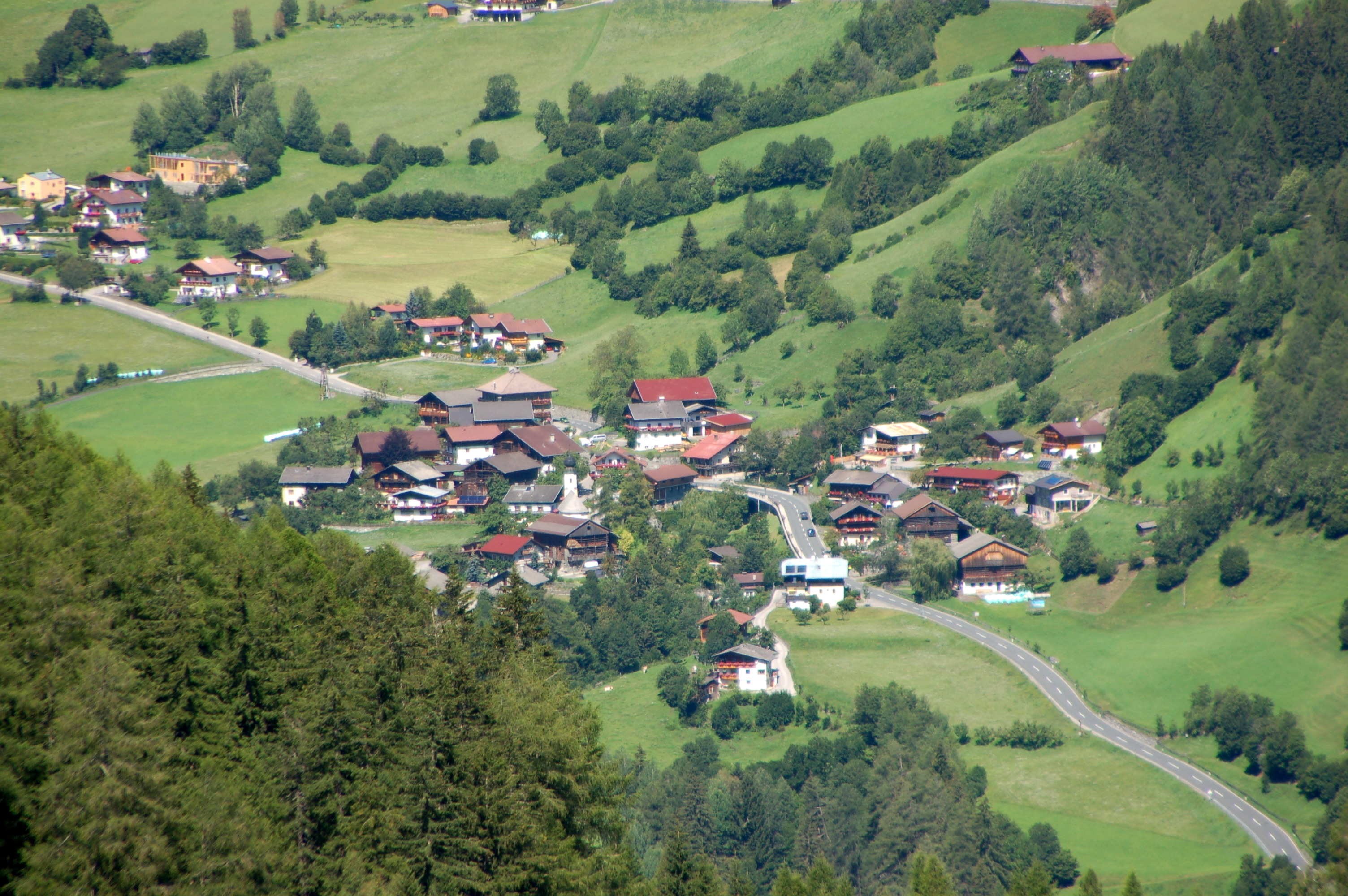 Blick auf den Ortskern der Gemeinde Mitteldorf vom Weg auf die Zunigalm